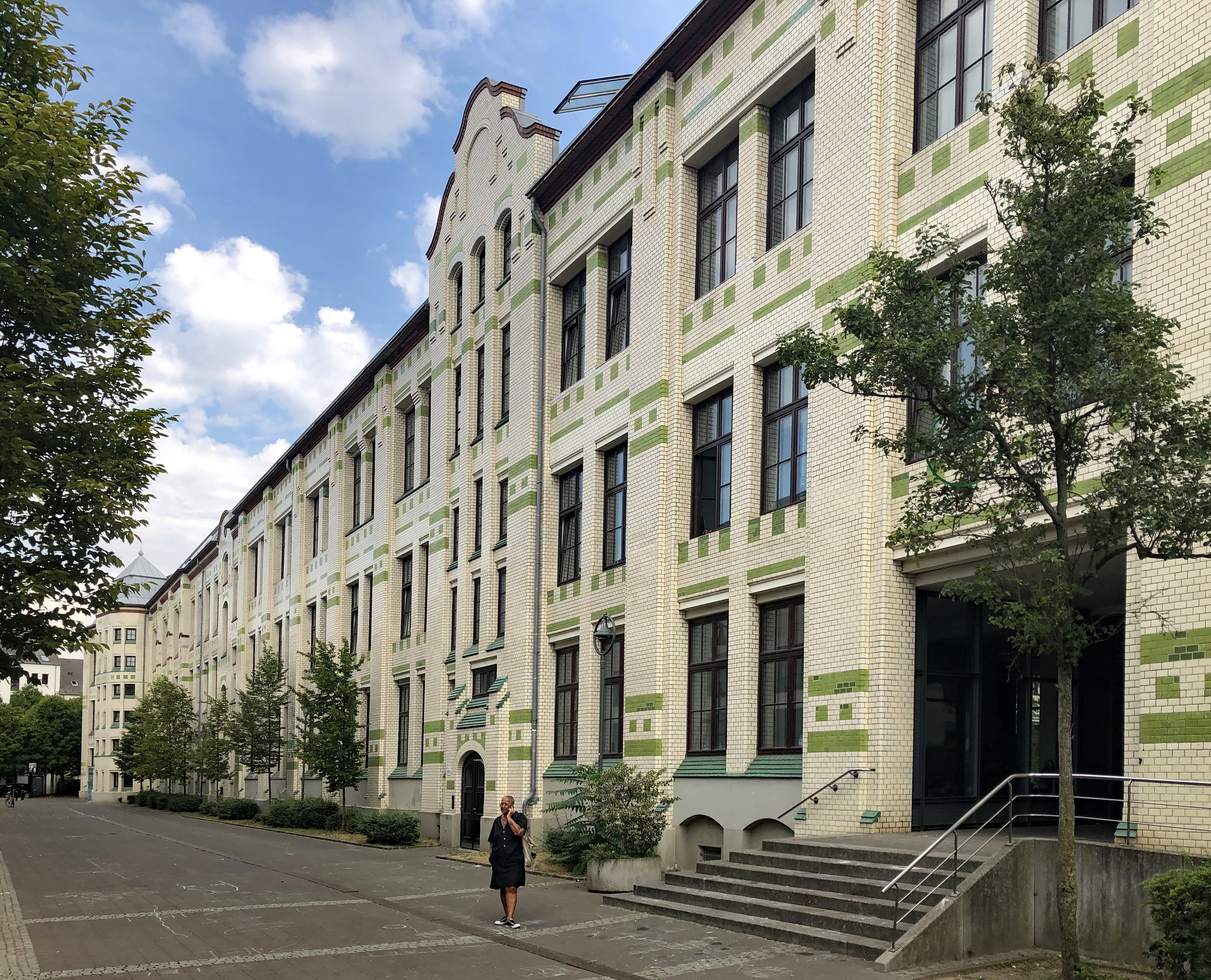 Salzmann-Bau, Rückseite zur Himmelgeister Straße 107b–107a, Düsseldorf-Bilk